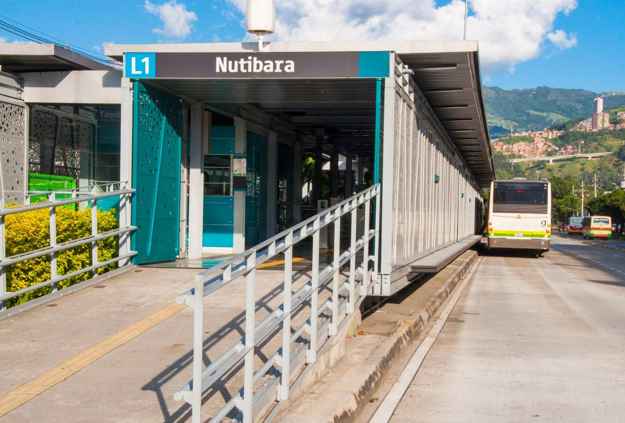 Estación Nutibara (Metroplús)